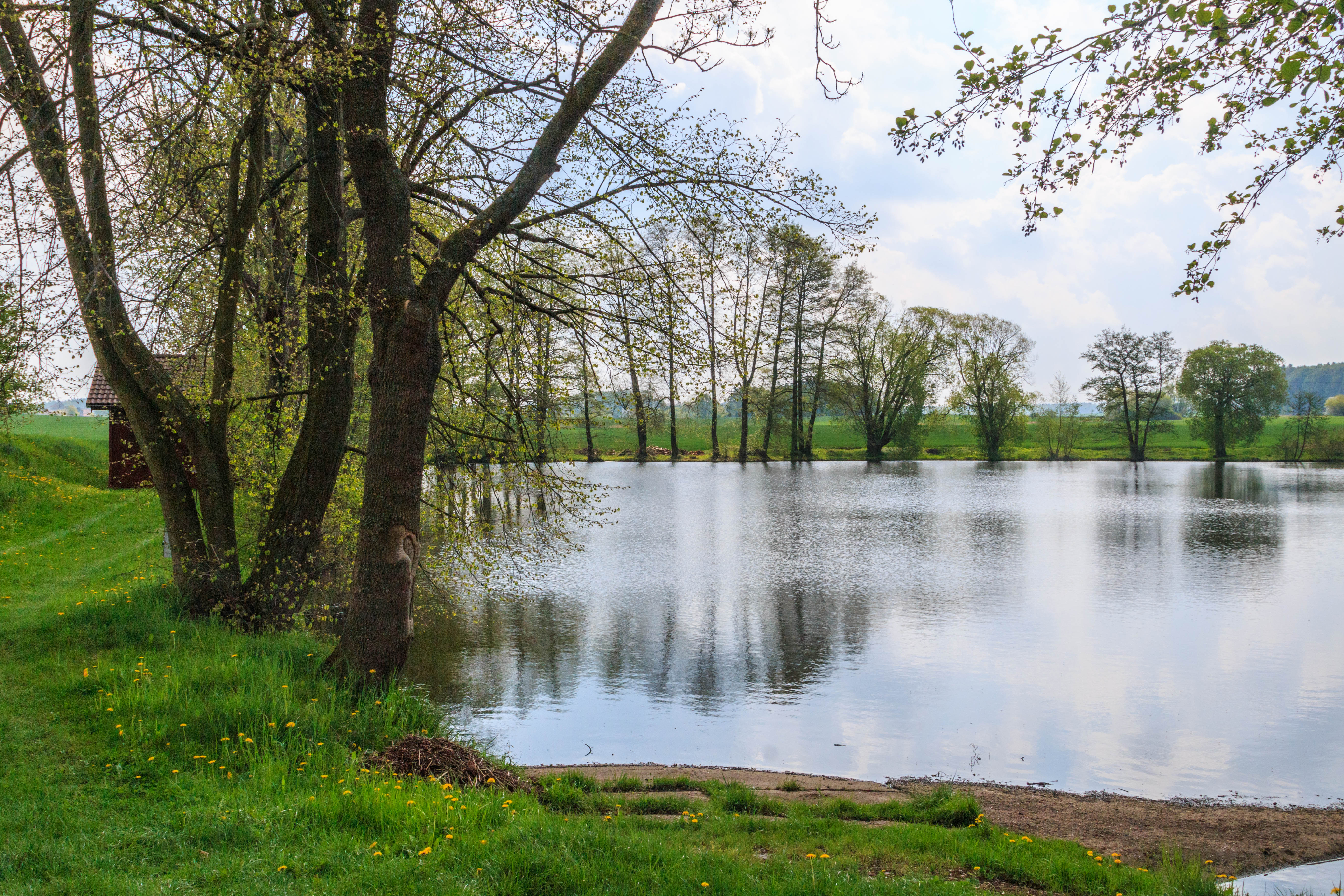 Pelechovský rybník Project: Vodstvo.